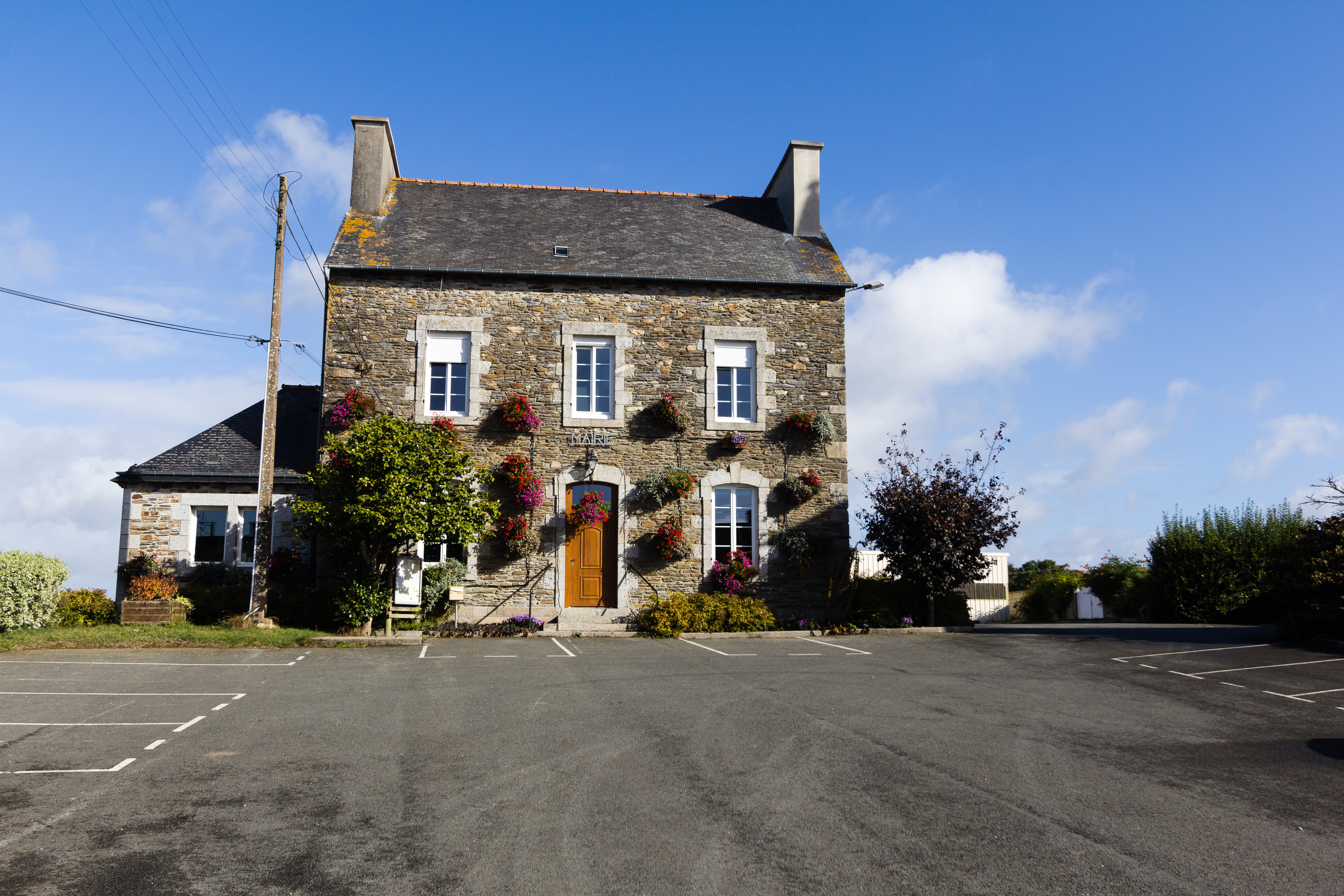 Mairie de Le Bodéo (France).